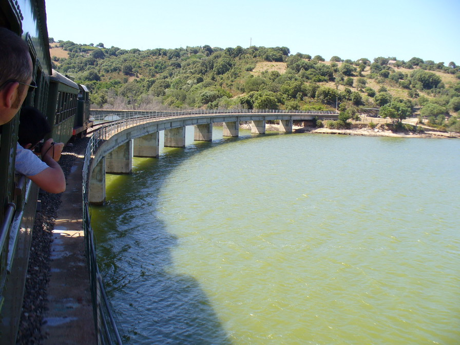 Trenino Verde - Lago di Liscia - viaduct over the lake